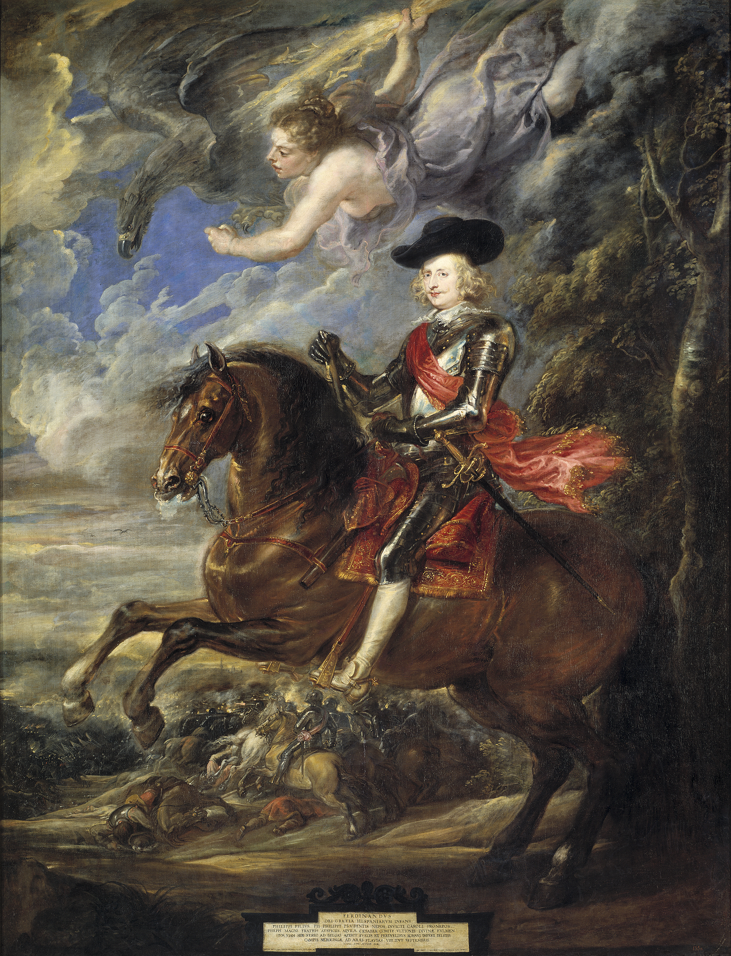 Retrato del cardenal-infante Fernando de Austria († 1641), que fue hijo del rey Felipe III de España y se hizo célebre por derrotar aplastantemente al ejército sueco en 1634 en la batalla de Nördlingen.